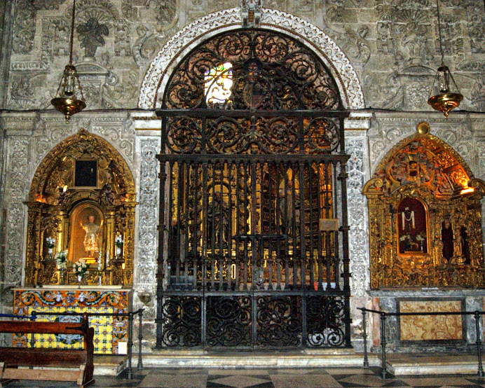 Portada y reja de la capilla de San Leandro de la catedral de Sevilla, (España). La reja fue realizada en el año 1734 por Francisco Guzmán y por Francisco de Ocampo. A la izquierda de la reja que Cierra el acceso a la capilla de San Leandro puede verse el altar del Niño Mudo, y a la derecha el altar de Nuestra Señora de la Alcobilla. La portada barroca en piedra tallada de la capilla de San Leandro fue realizada por Matías de Figueroa y por Diego de Castillejo en 1.733 e imitando la de la vecina capilla de San Isidoro de la catedral de Sevilla, siendo costeada por Domingo Valentín Guerra Arteaga y Leiva, obispo de Segovia.